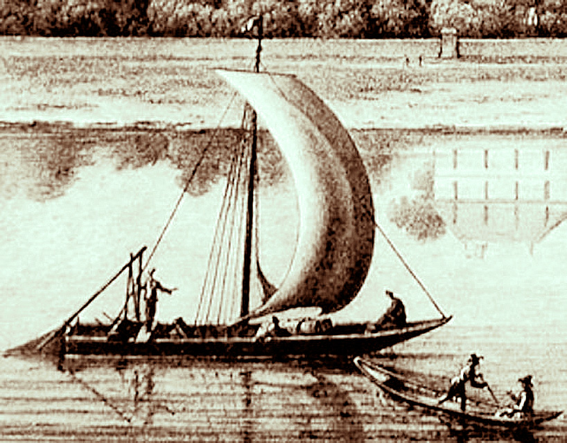 Chaland de Loire ou Gabare (bateau à une voile) transportant du vin de l'embouchure de la Loire jusqu'à Pont-de-Cées